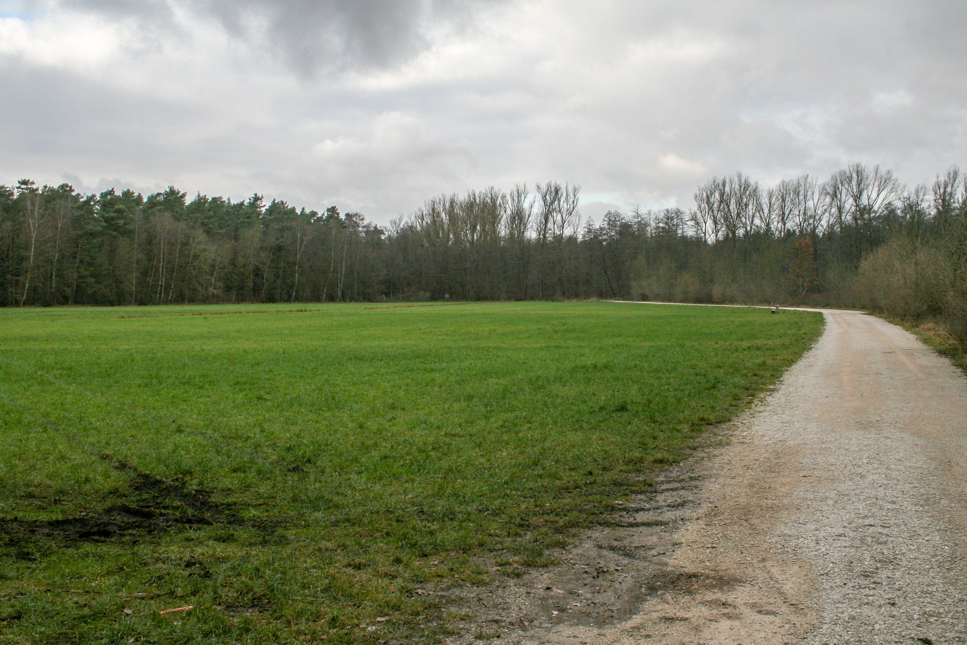 Russenwiese, Fischbach, Forsthof